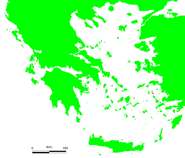 GR Lipsi.PNG (Greek island)